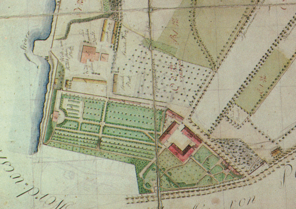 Klein Glienicke, Parkplan von Hellwig 1805, Ausschnitt Schlossbereich